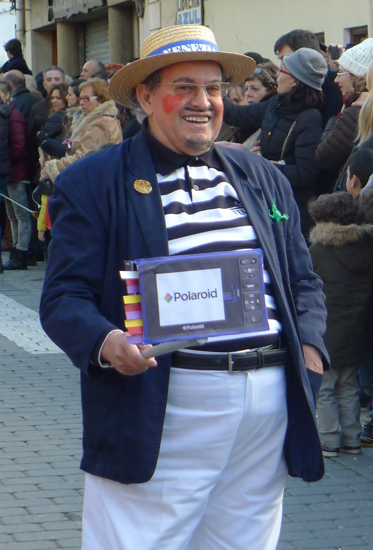 Carnaval 2015